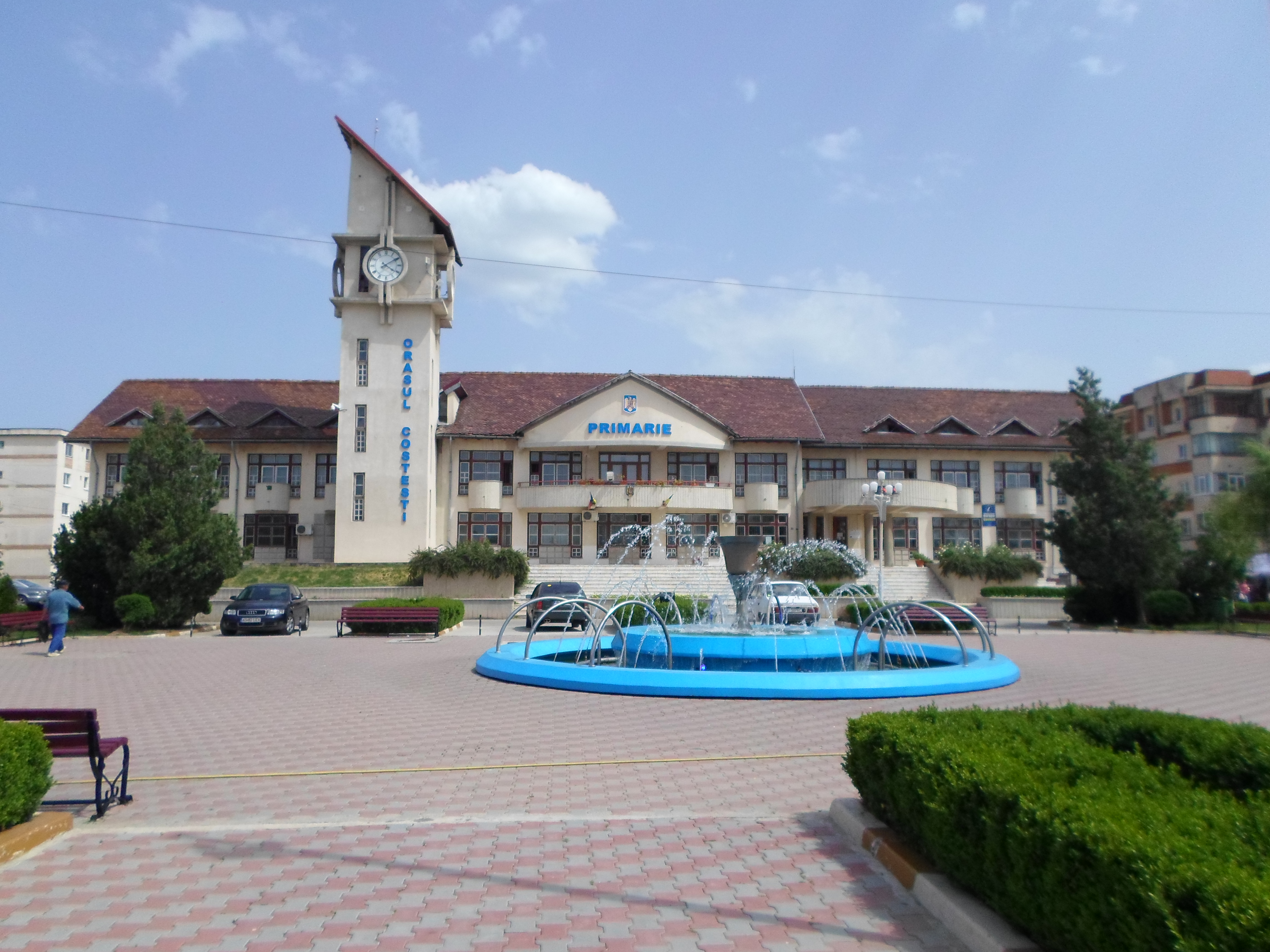 Primaria orașului Costești